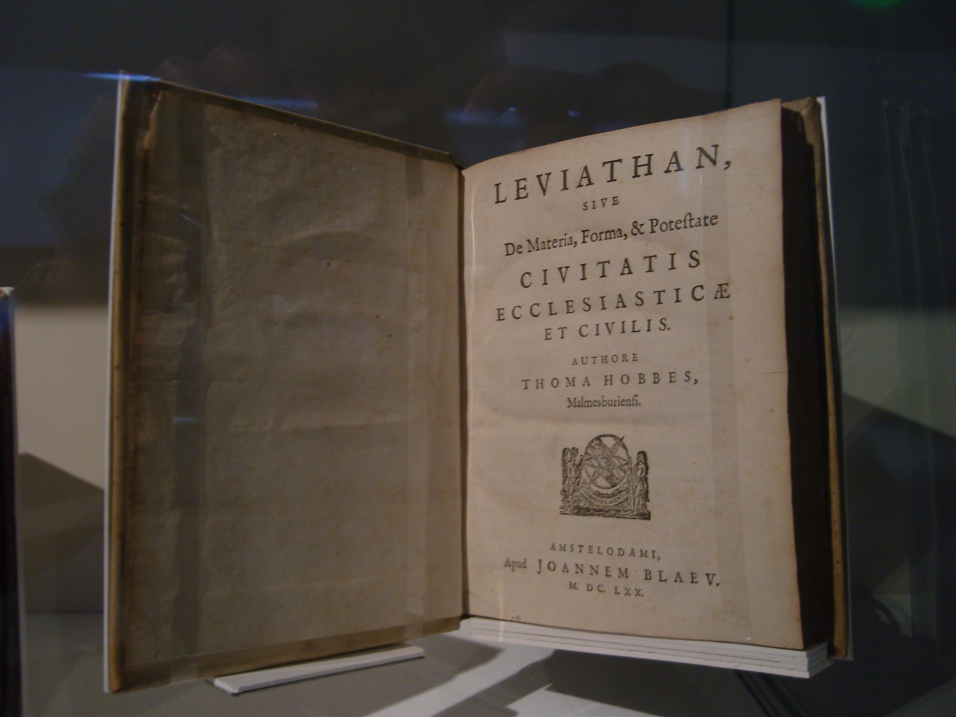 Leviathan von Thomes Hobbes, ausgestellt im Militärhistorischen Museum der Bundeswehr in Dresden